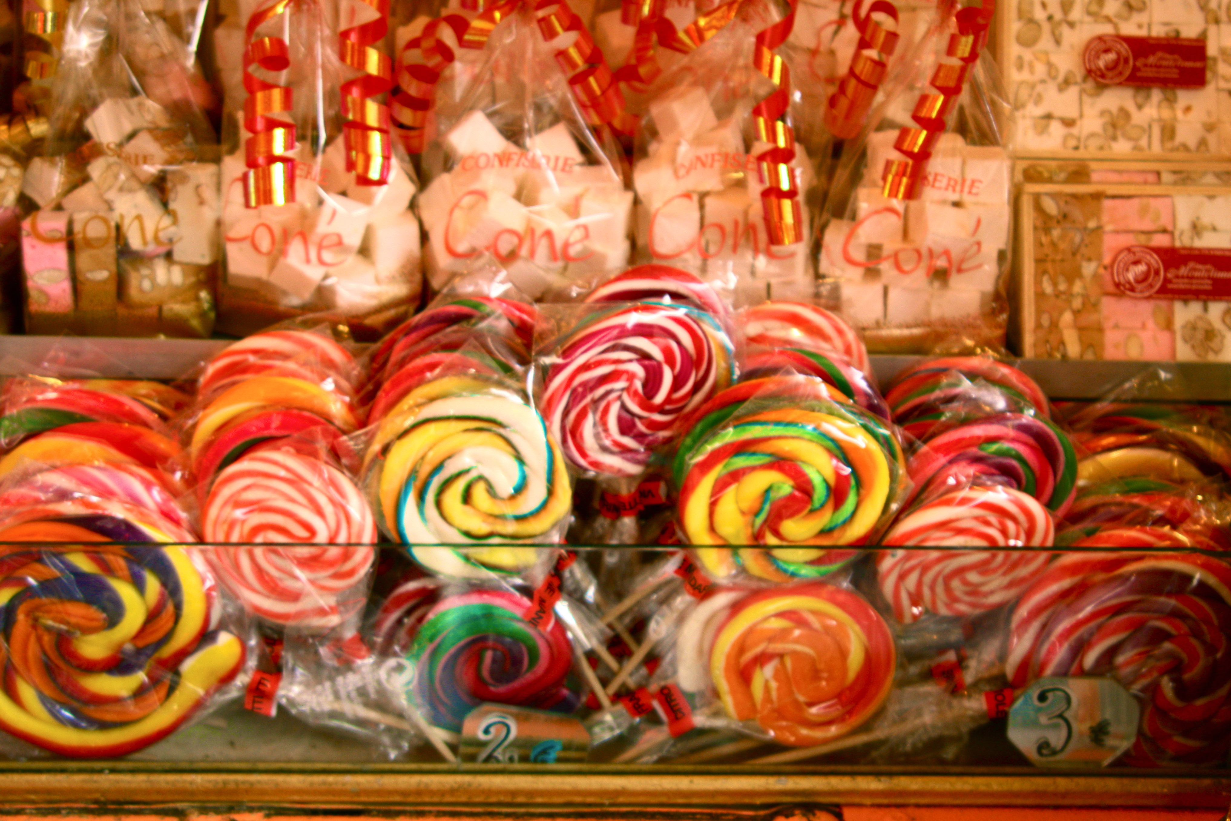 Lutschen op der Kiermes.